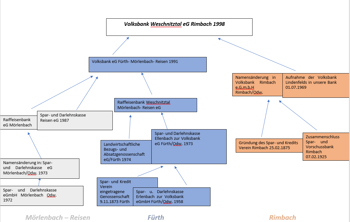 geschichte